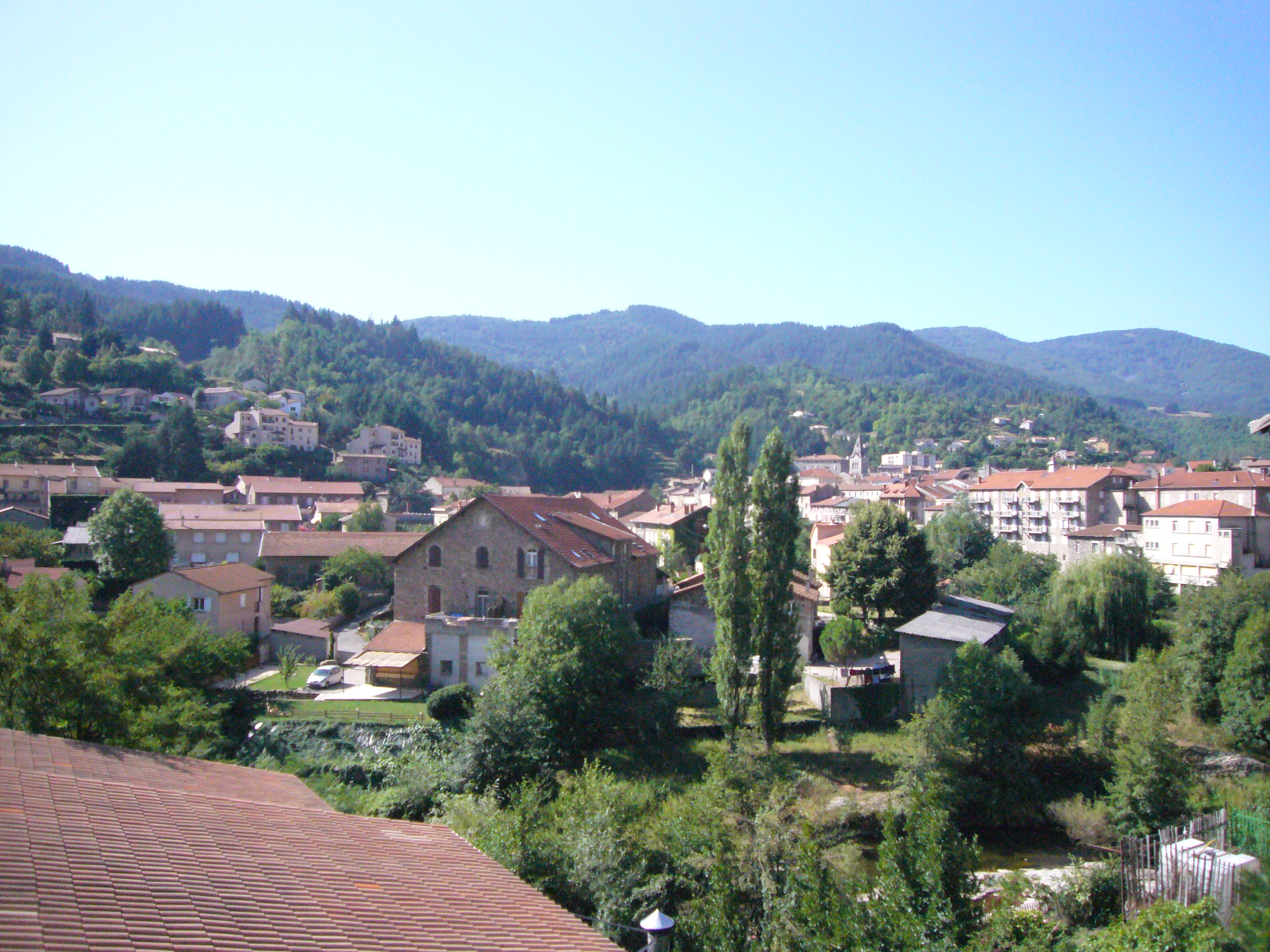 Vue générale de la ville du Cheylard, Ardèche, France